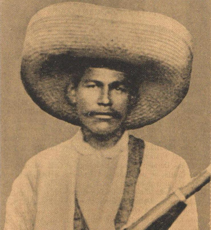 General Piouinto Galis